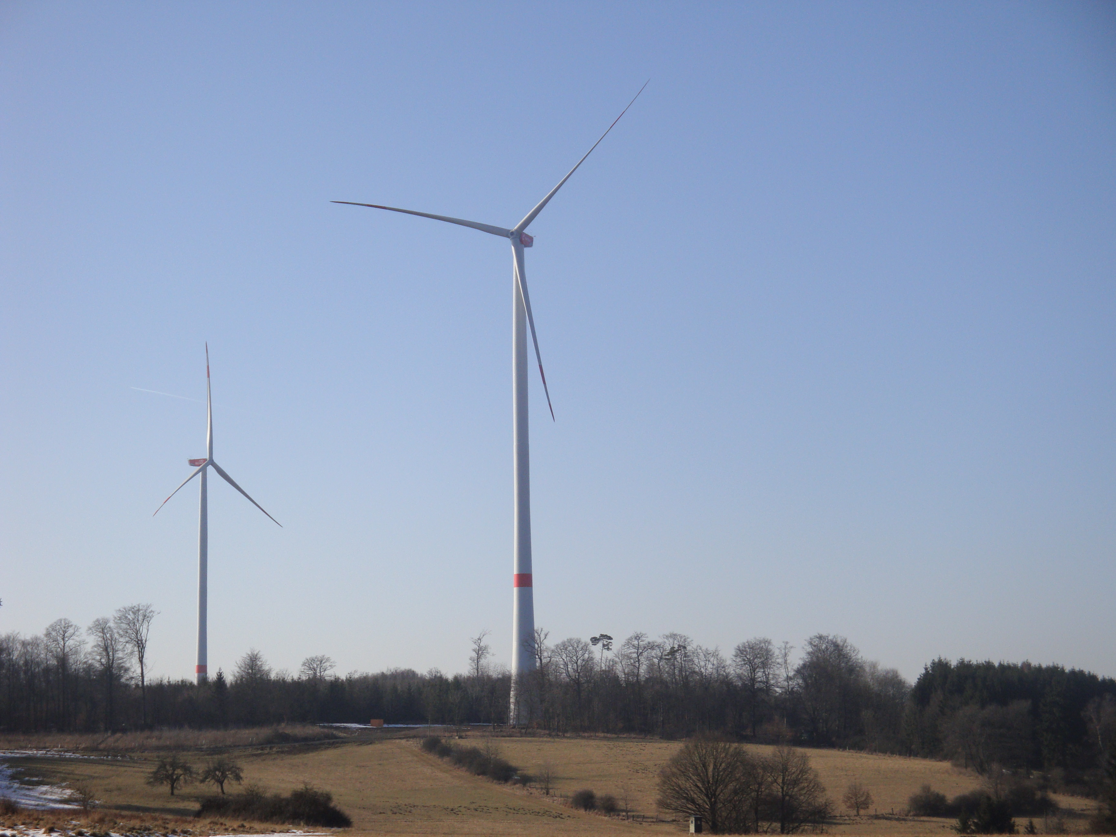 Nordex N117 im Windpark Hohenahr